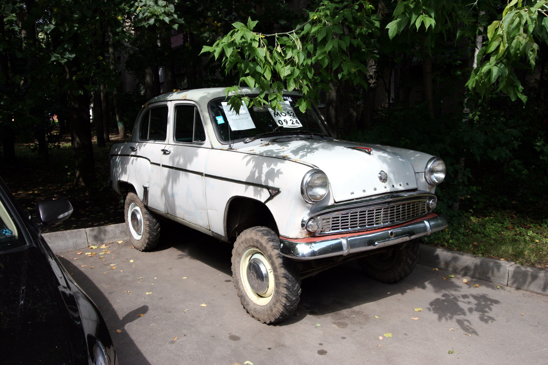 Super car Moskvitch